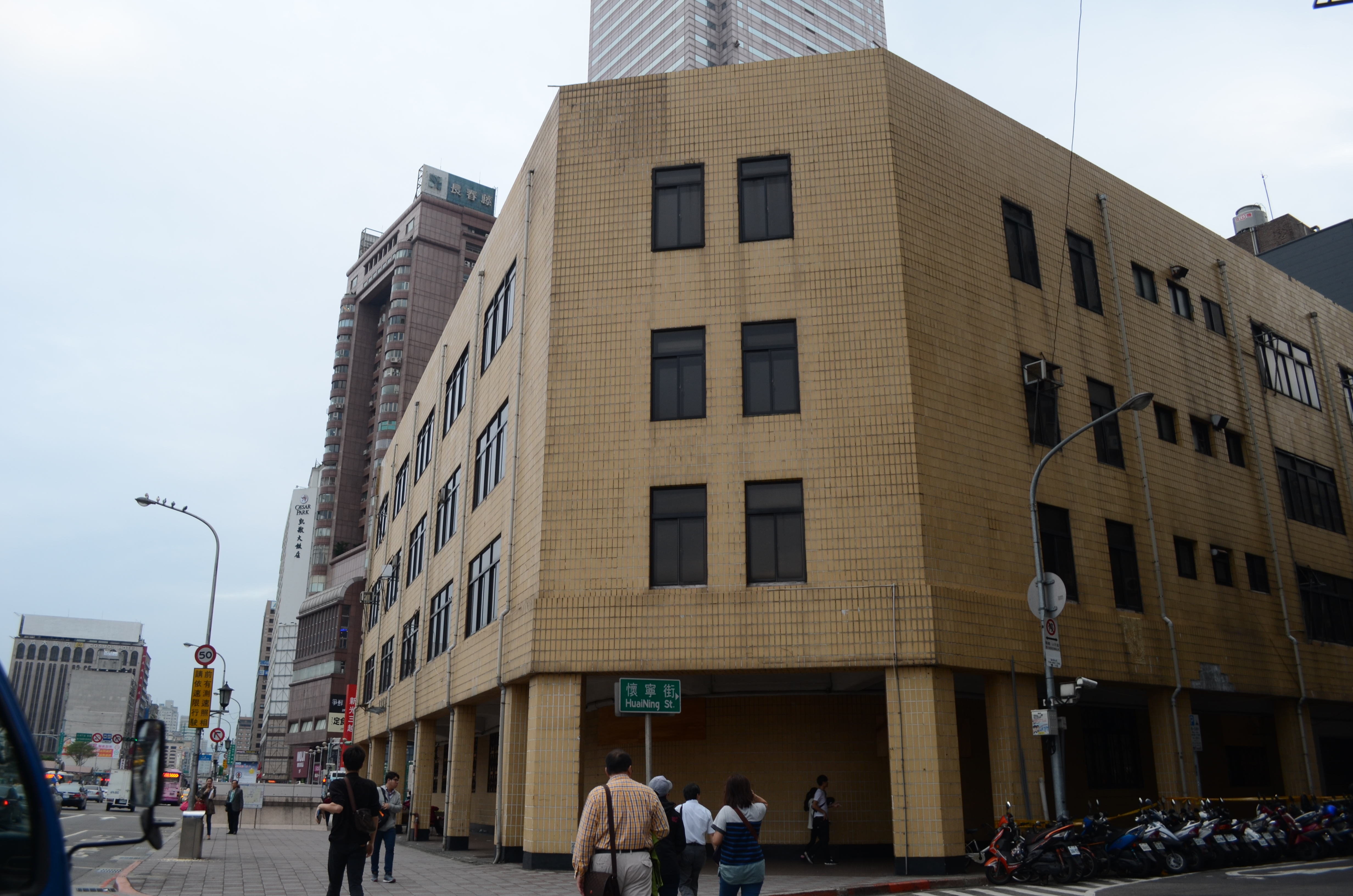 中文（台灣）: 原大阪商船臺北支店修復前。